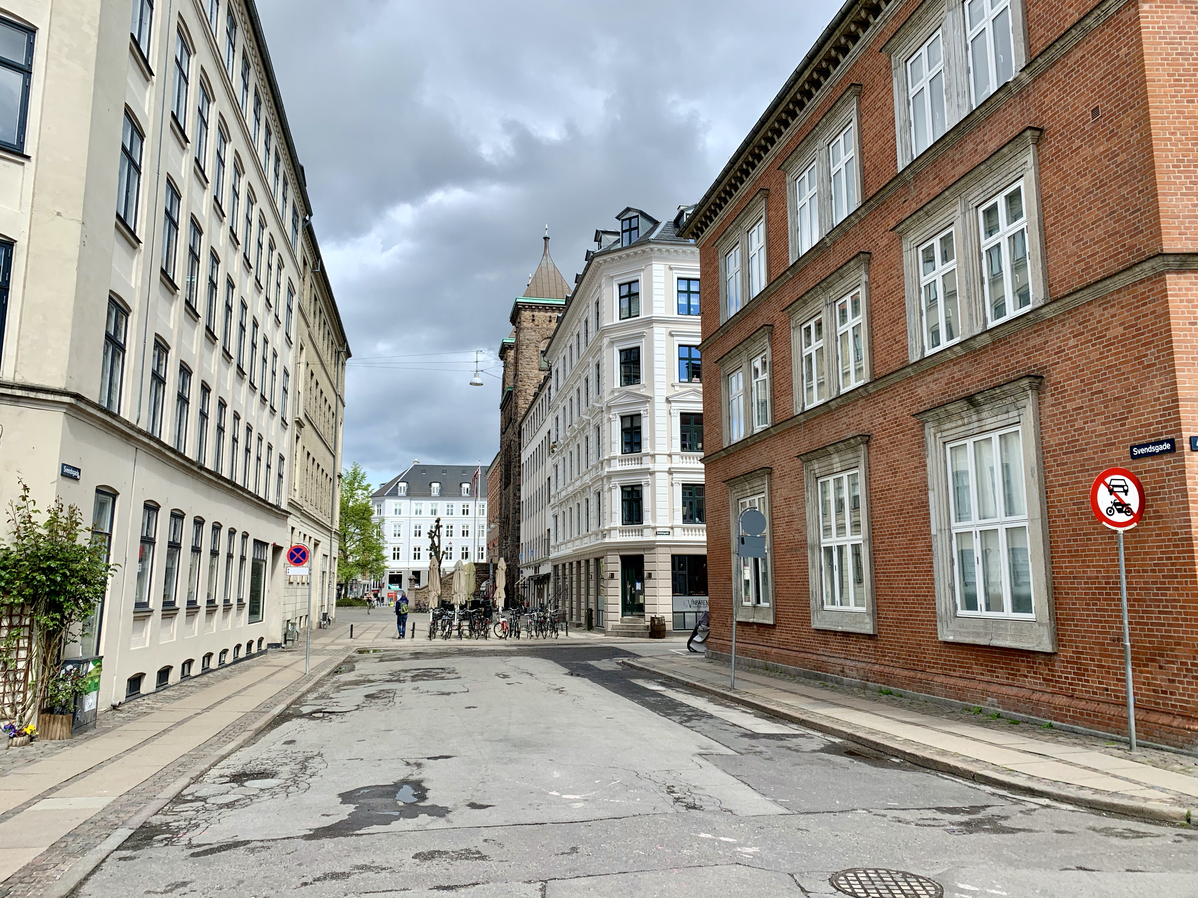 Svendsgade i København